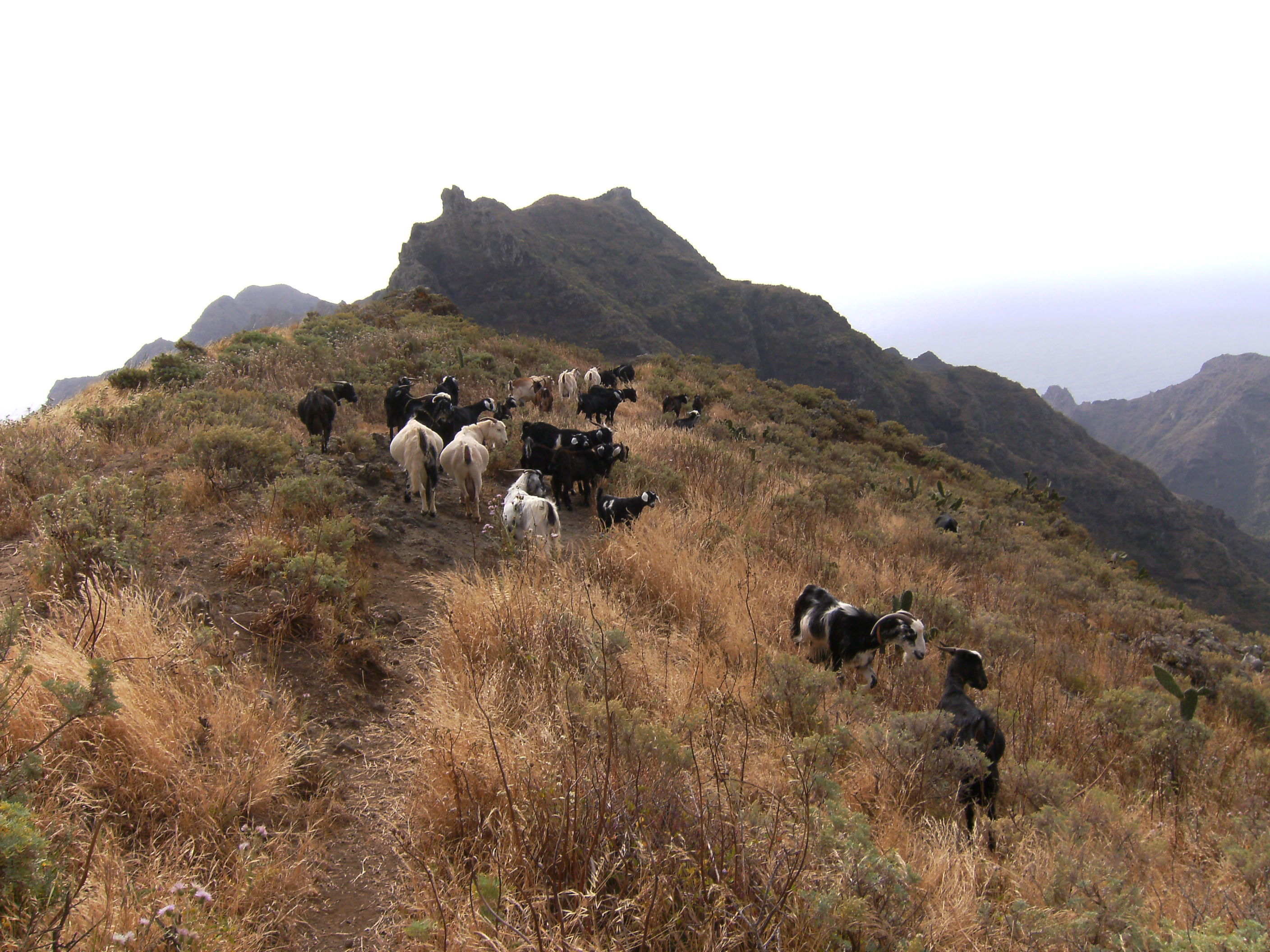 Rebaño de cabras en Anaga, Tenerife.